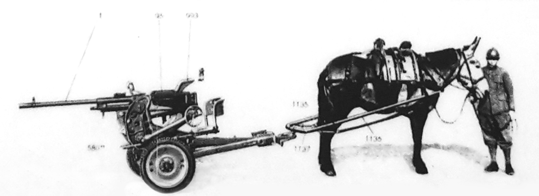 Breda 20/65 Mod. 1935 trainato da un mulo